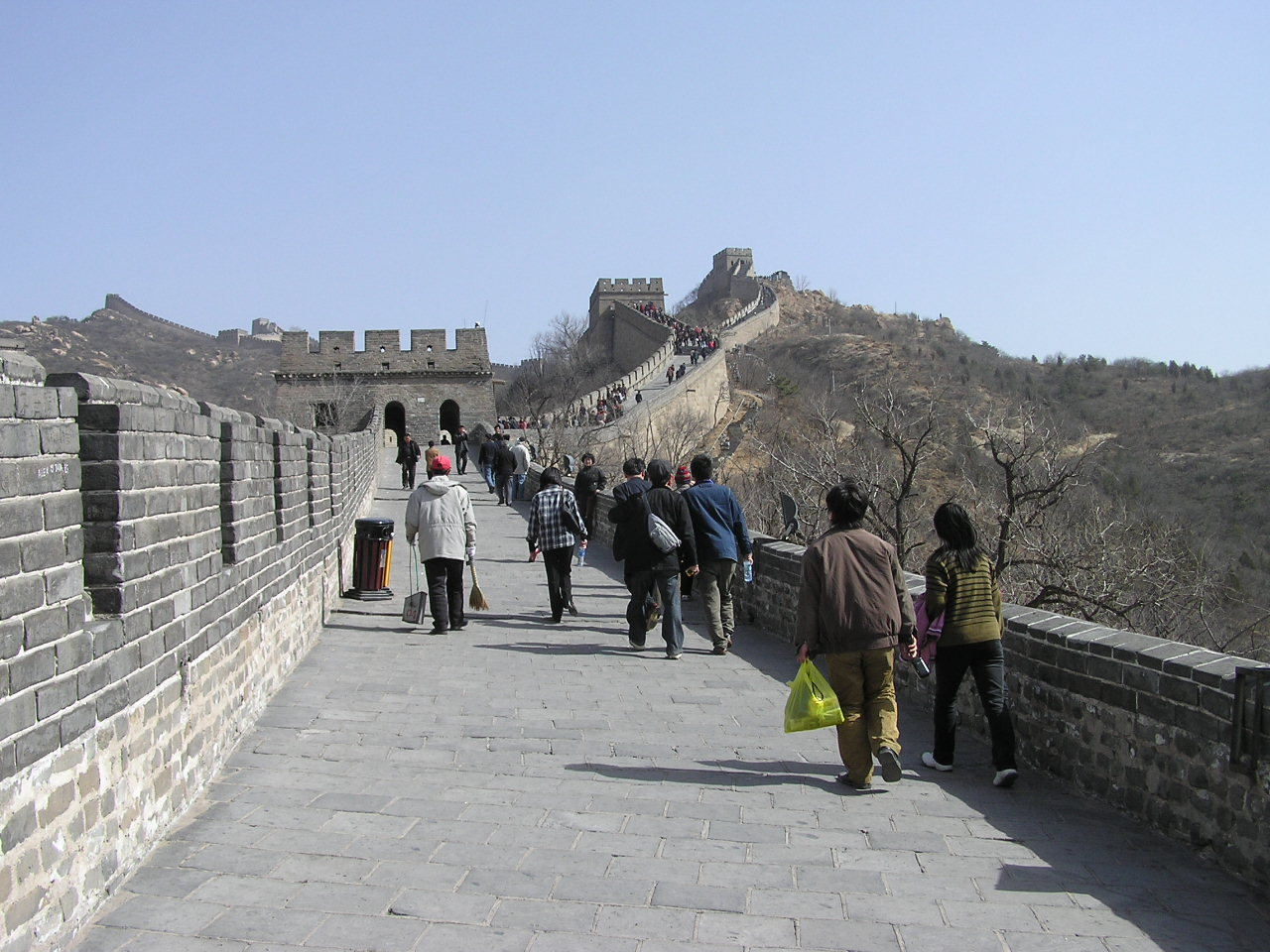 Velká čínská zeď, úsek zrekonstruovaný a přístupný pro turisty